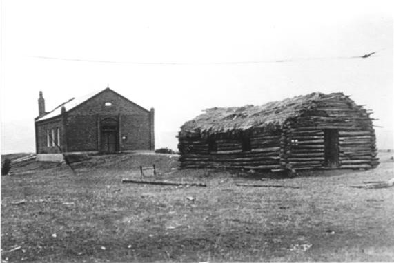 Capilla Bethel (vieja y nueva) Trevelin ca.1910